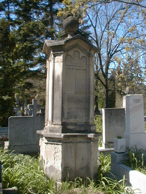 Szentiváni Mihály (Nyárádgálfalva, 1813. május 30. – Kolozsvár, 1842. december 10.) költő, író, publicista sírja Kolozsvárott, a Házsongárdi temetőben. 097